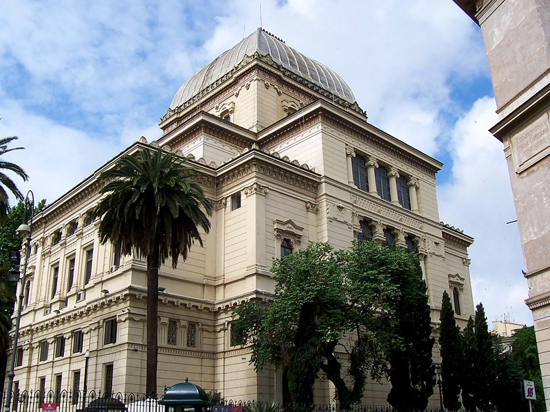 Roma - Sinagoga